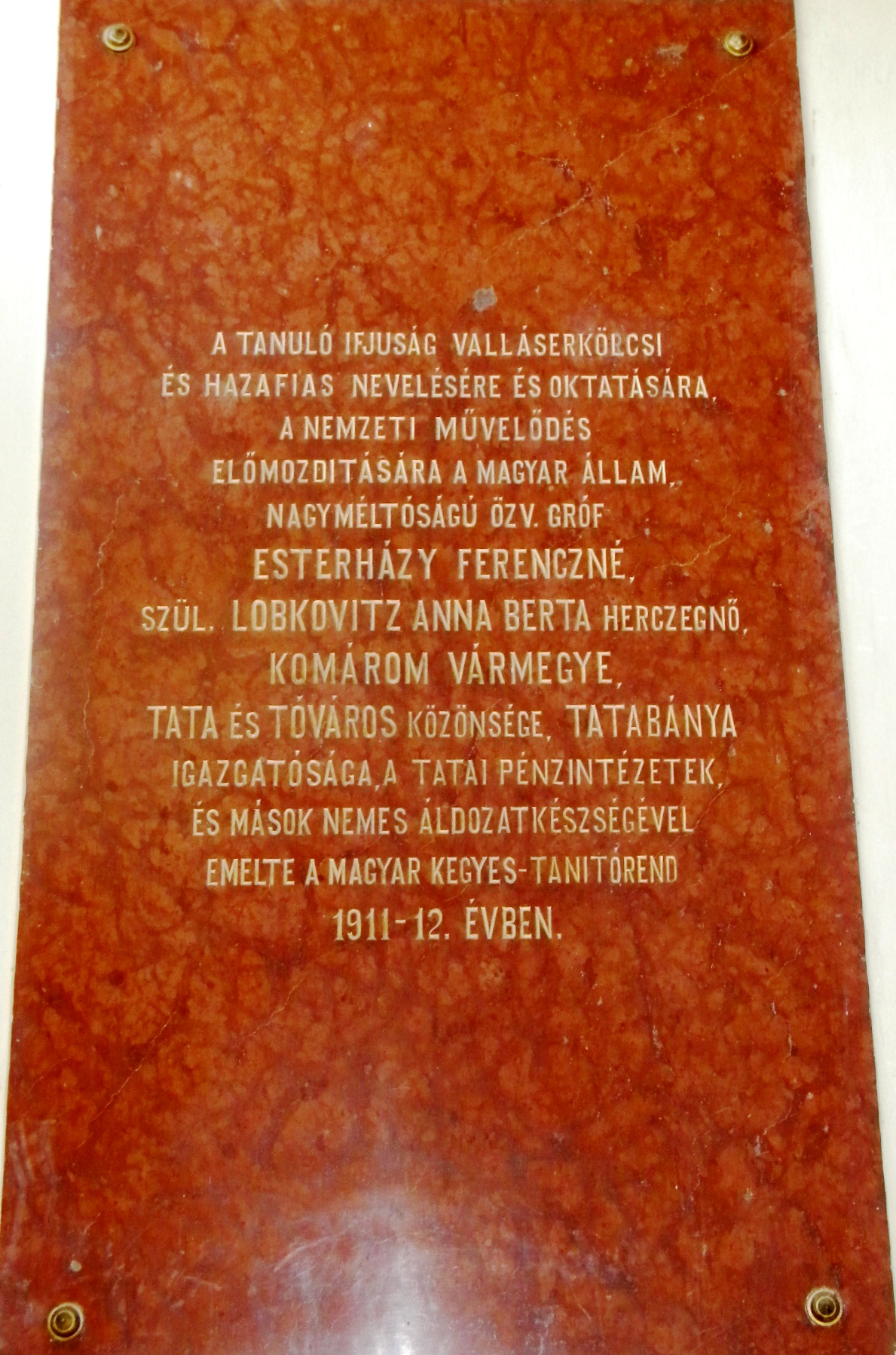 Az emléktáblán, mely a tatai Eötvös József Gimnáziumban található, azoknak a névsora olvasható, akik 1912-ben az iskola számára átadott új épületrész megépítését segítették. Vonatkozó szócikk: Pintér Elek